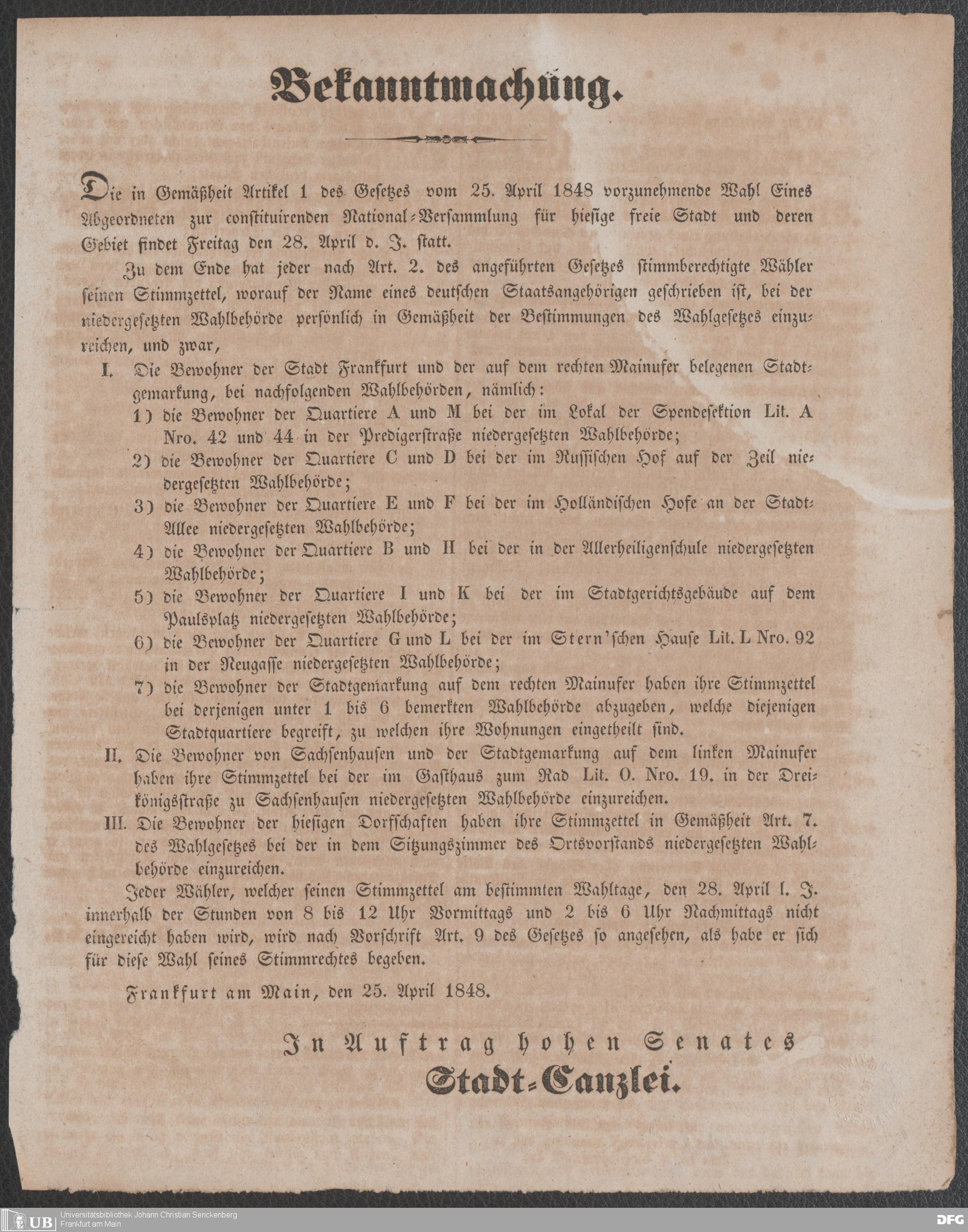 Frankfurt am Main, Wahlbekanntmachung 1848